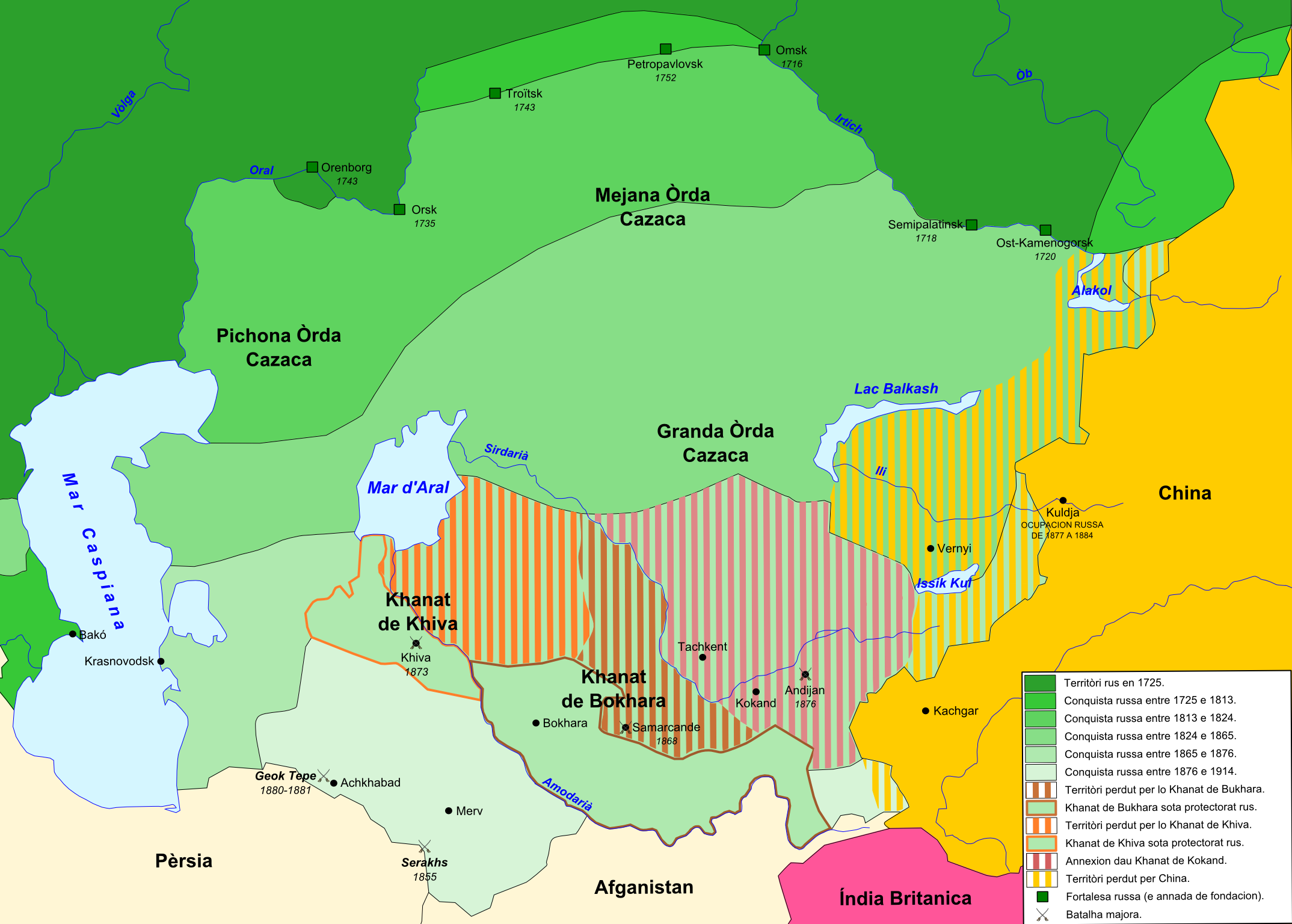 Expansion russa en Asia entre 1725 e 1914.